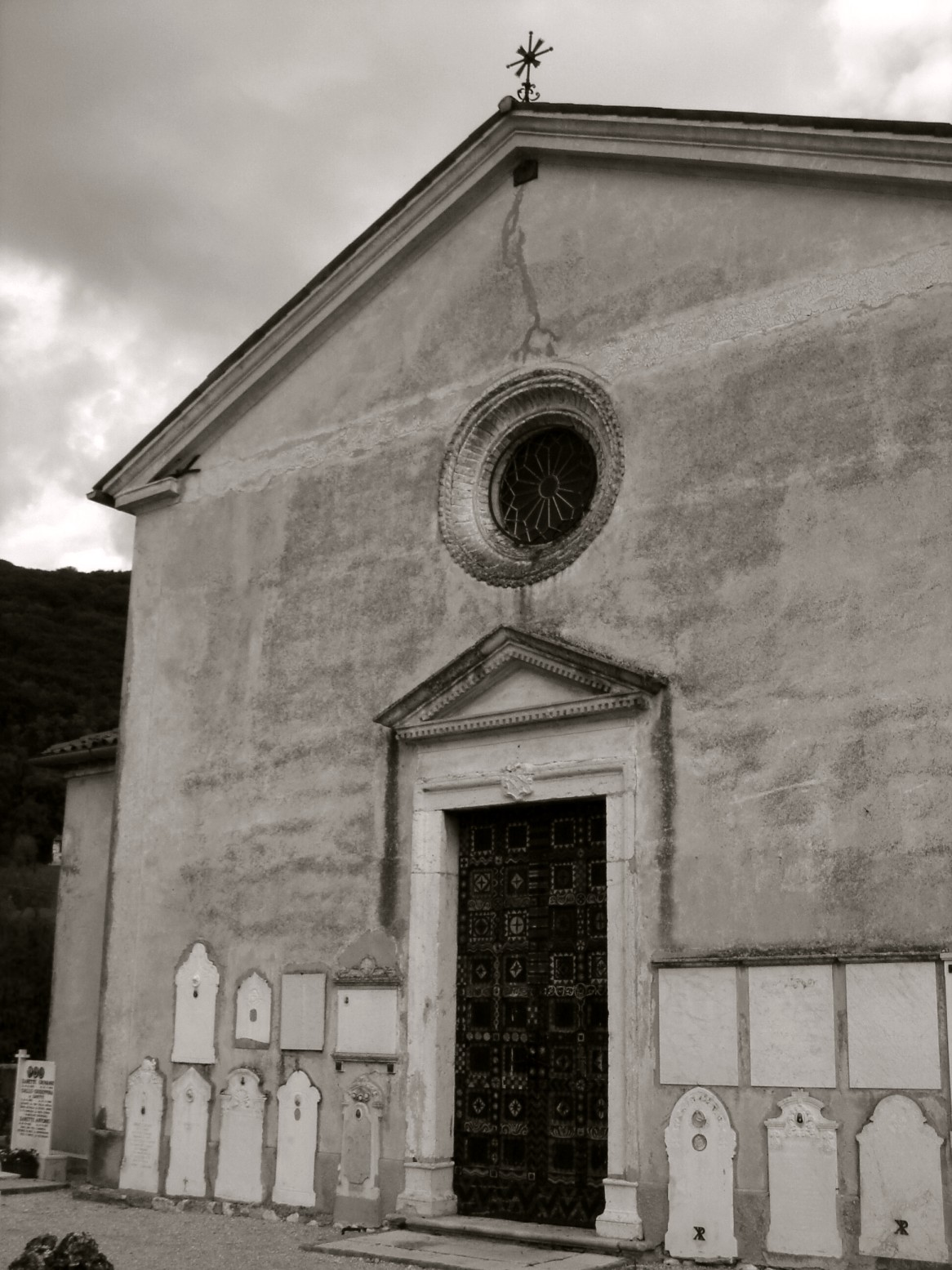 Rugolo di Sarmede (TV): facciata della chiesa parrocchiale di San Giorgio.